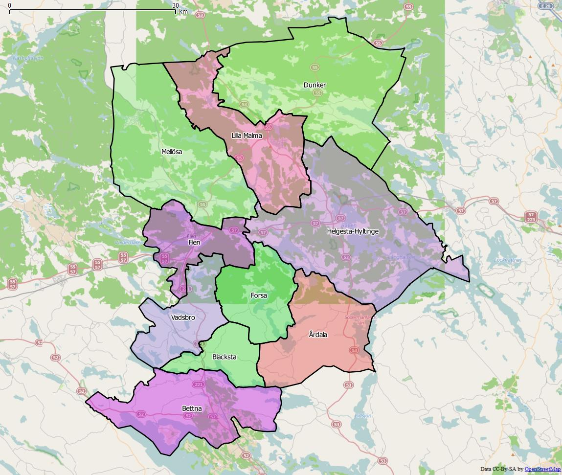 Distriktsindelningen i Flens kommun